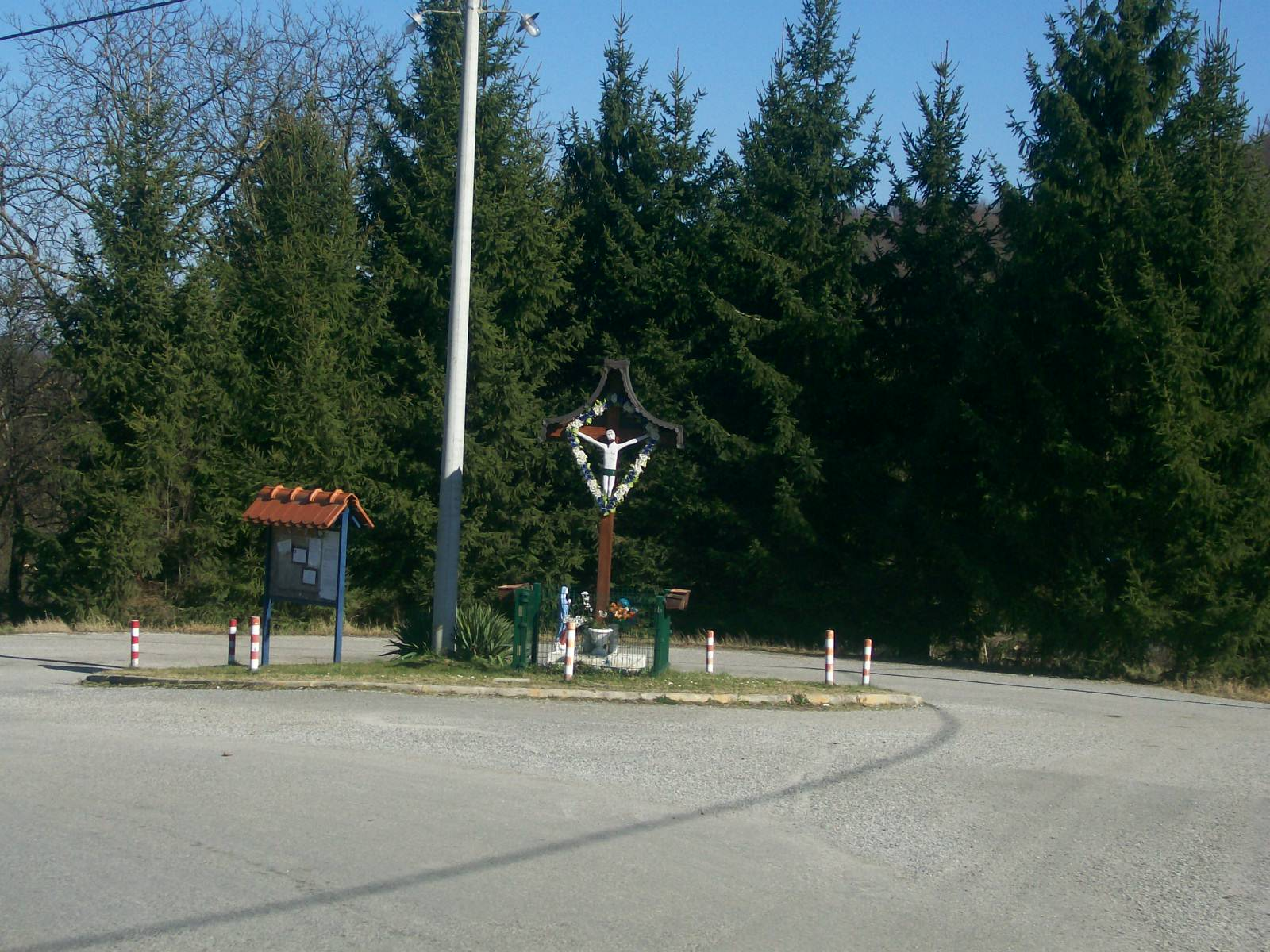 Raspelo u selu Žlebec Gorički, općina Marija Gorica (Zagrebačka županija)